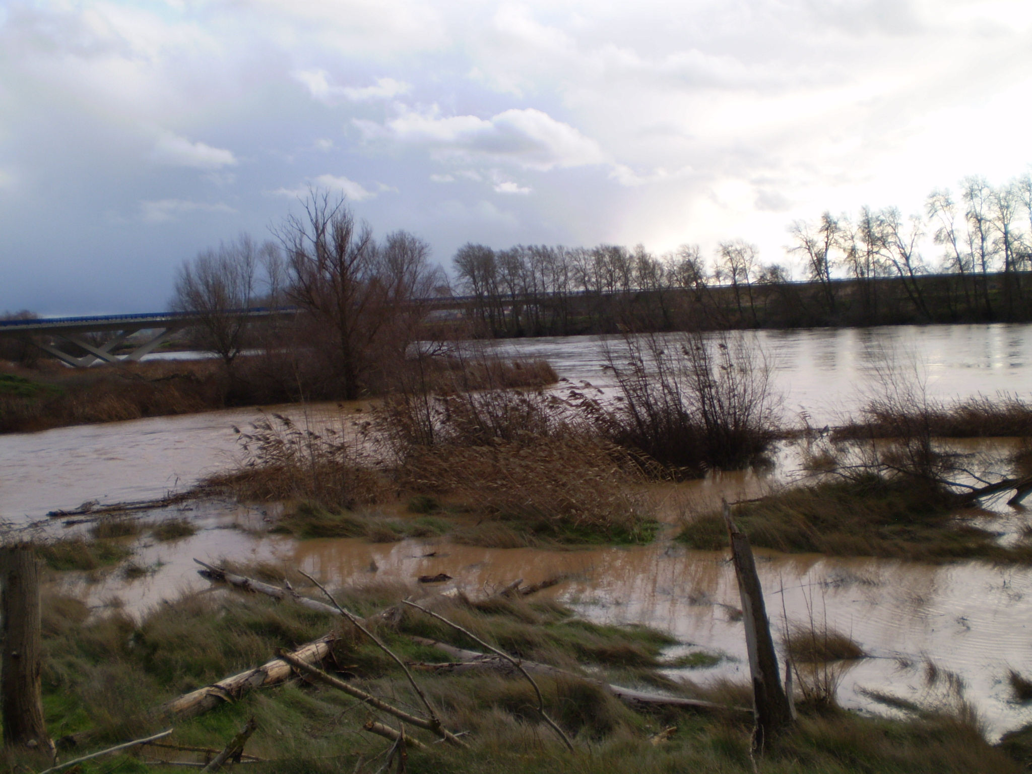 Desembocando el río Valderaduey en el río Duero.